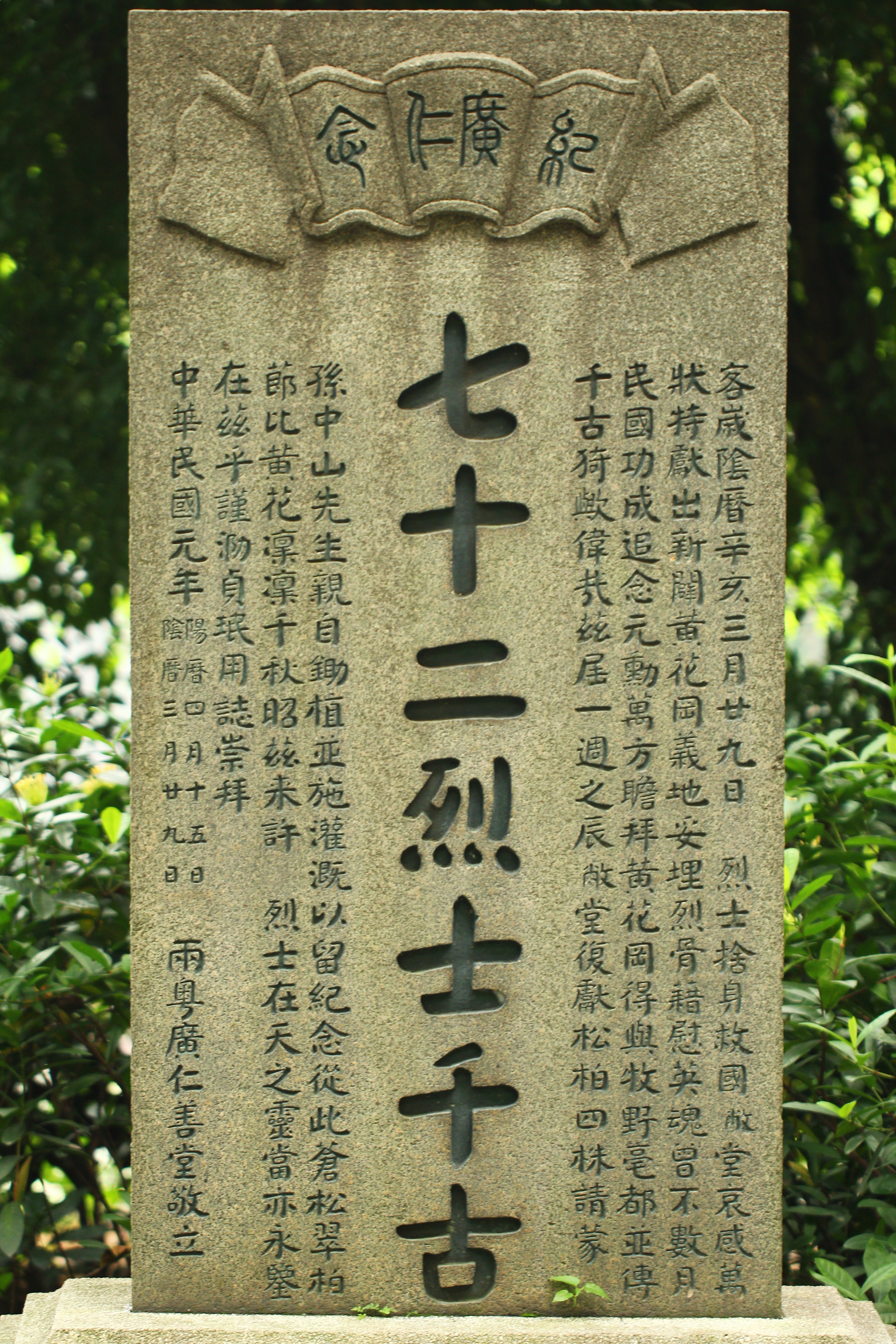 中華民國元年四月十五日，兩粵廣仁善堂敬立。